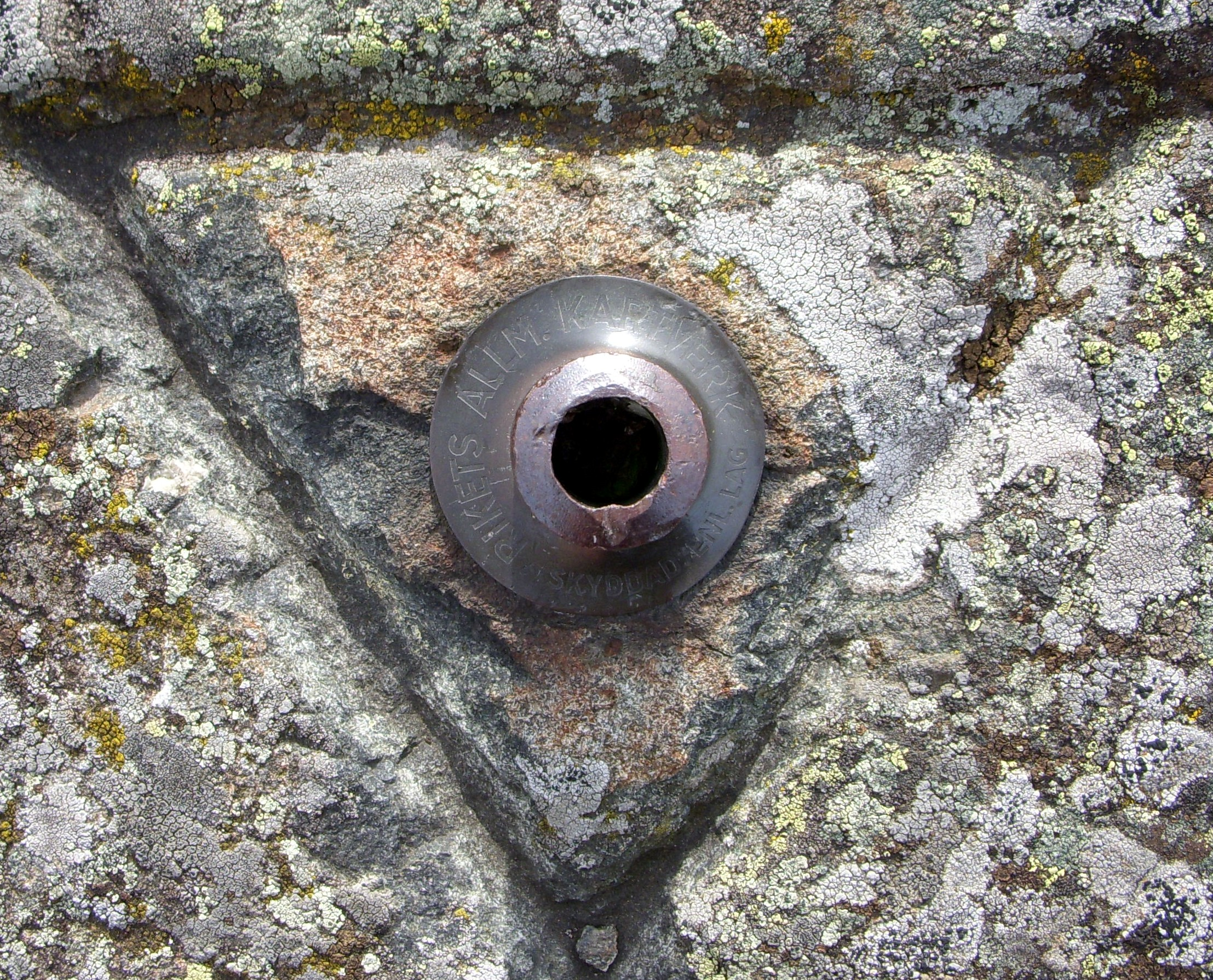 Stompunkt 125811 i det nationella referensnätet i plan av typen planpunkt på Hästbergs klack i Dalarna."Rikets allm. kartverk skyddad enligt lag"